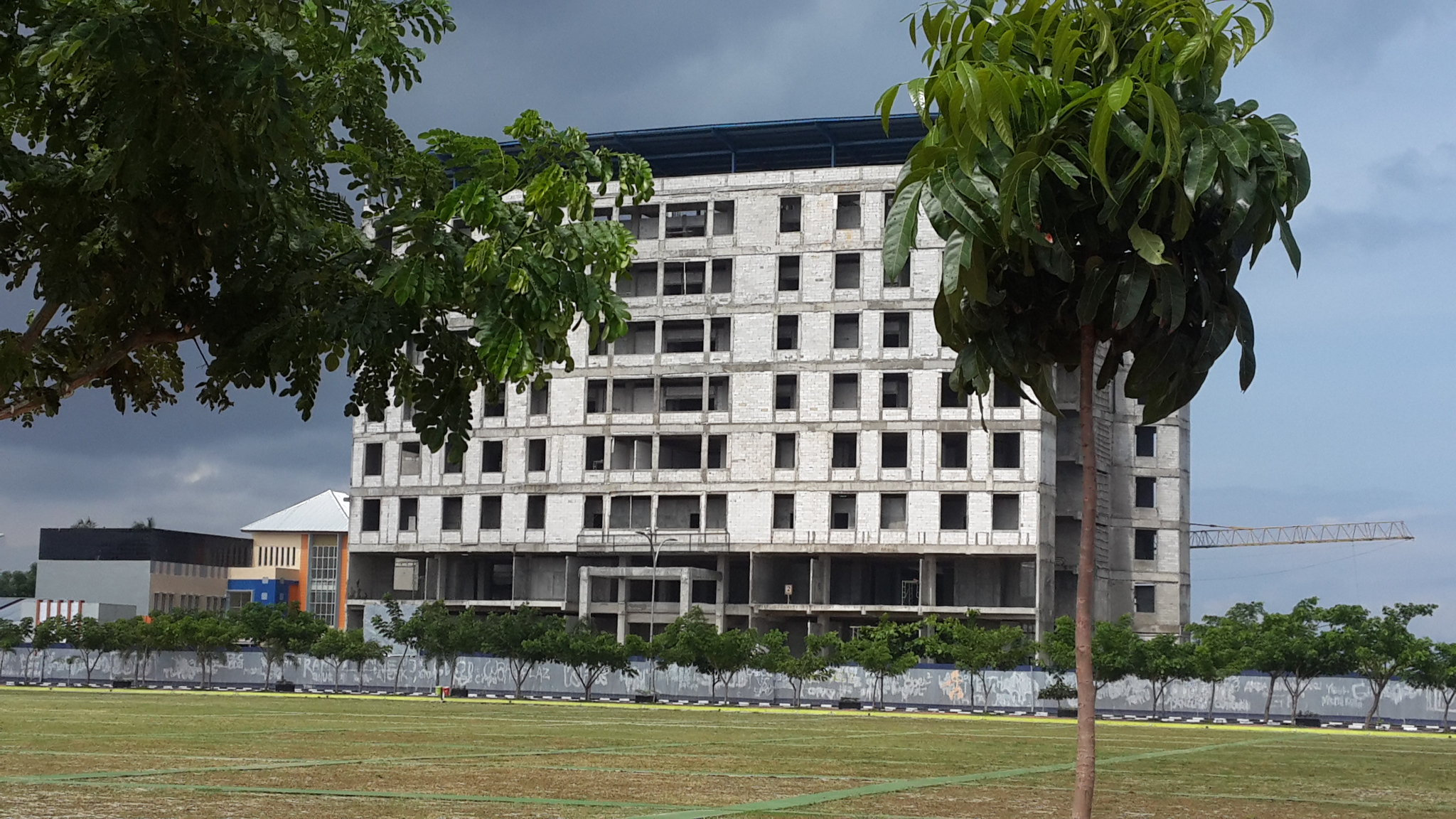 Rsud Bantaeng